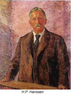 Hp-hanssen